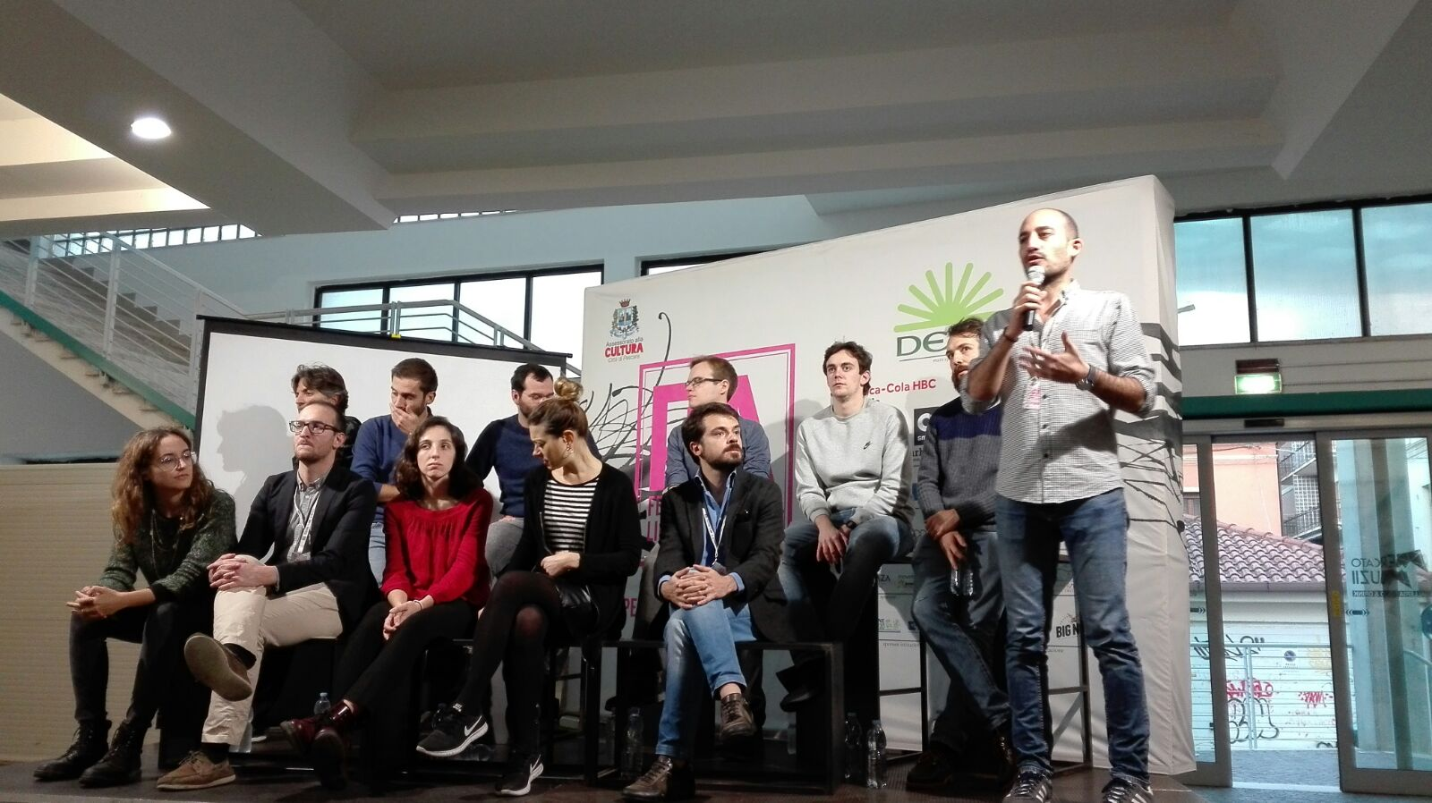 Parte della redazione del Post al FLA 2017, a Pescara